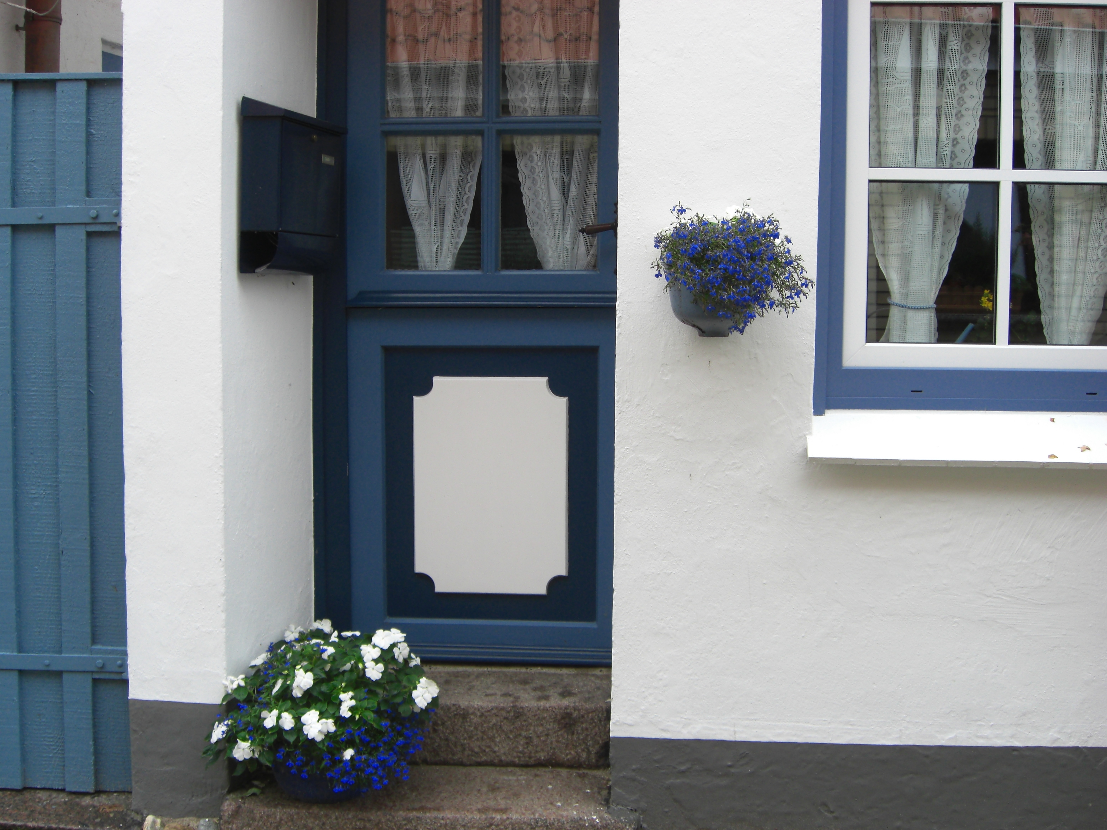 Haus in Holm, blaue Tür